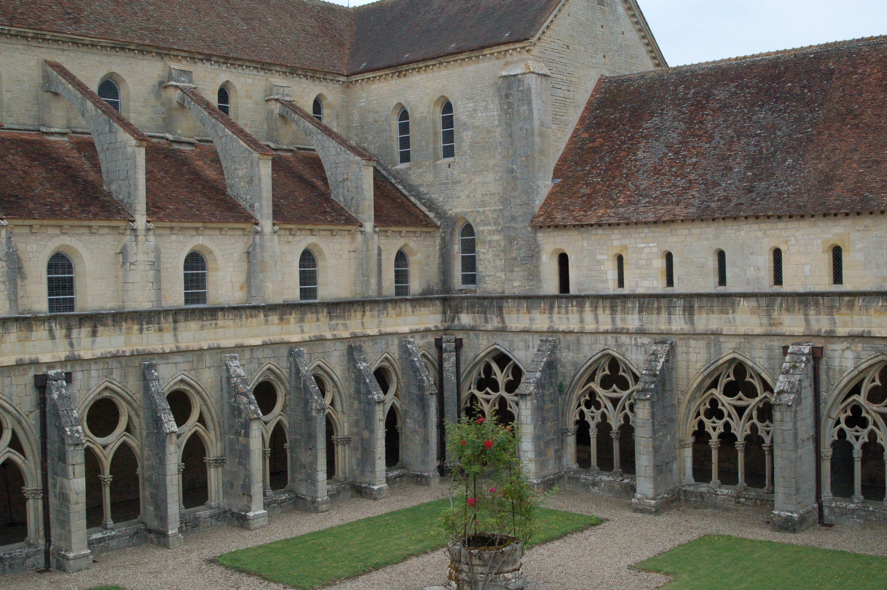 Le cloître et l'abbatiale de Noirlac (Bruère-Allichamps, Centre, France)